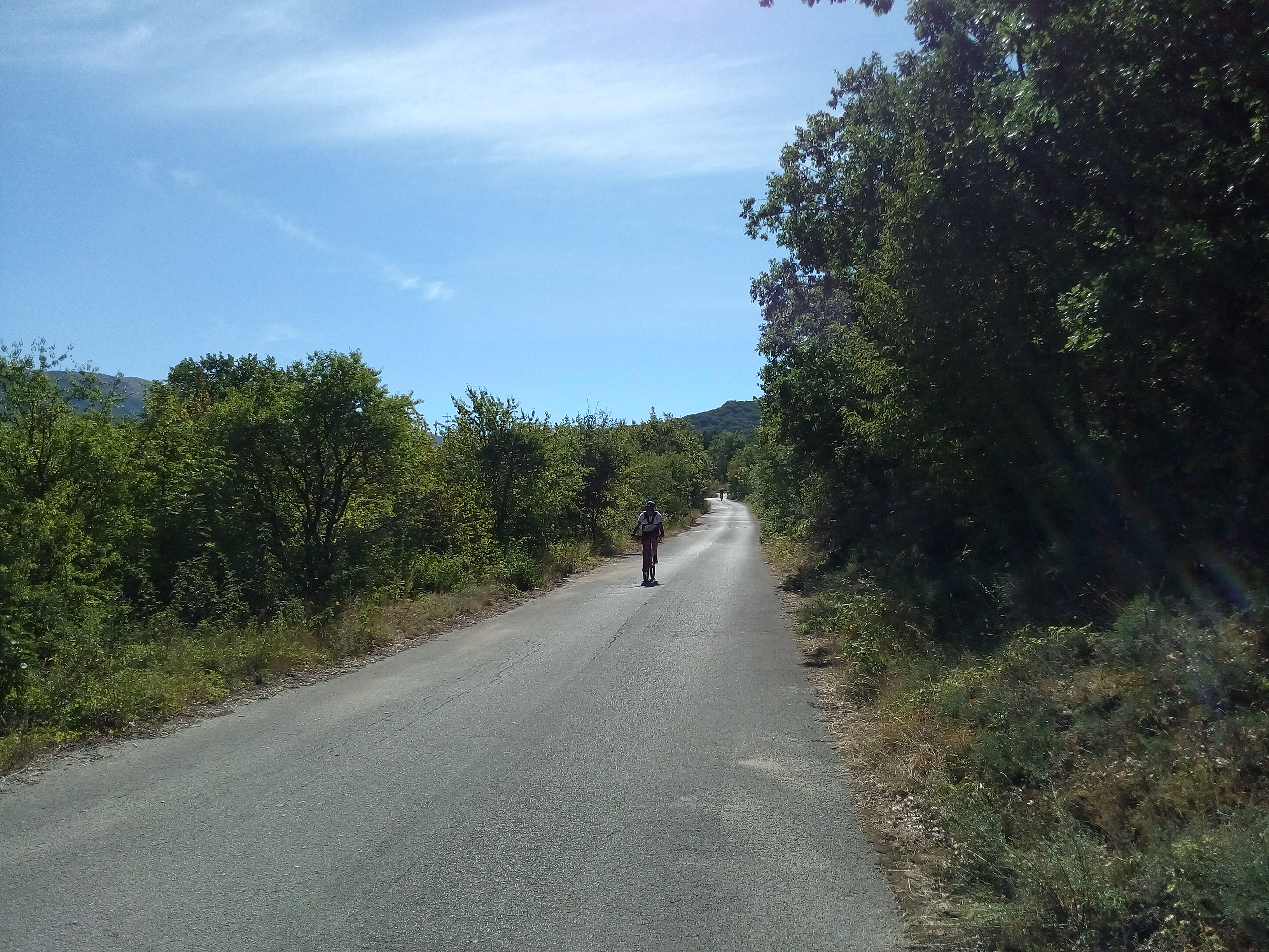 Prati di Sant'Elia, Collelongo, Abruzzo